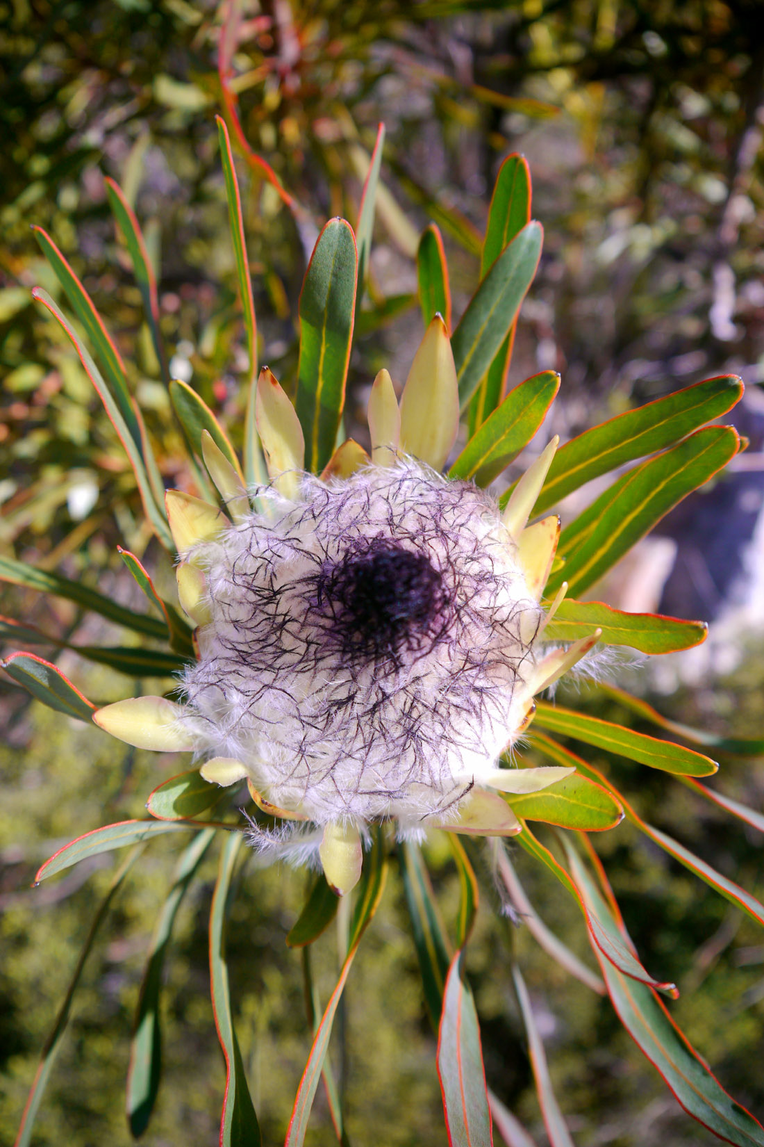 Protea longifolia in Fernkloof Nature Reserve (Hermanus, South Africa)